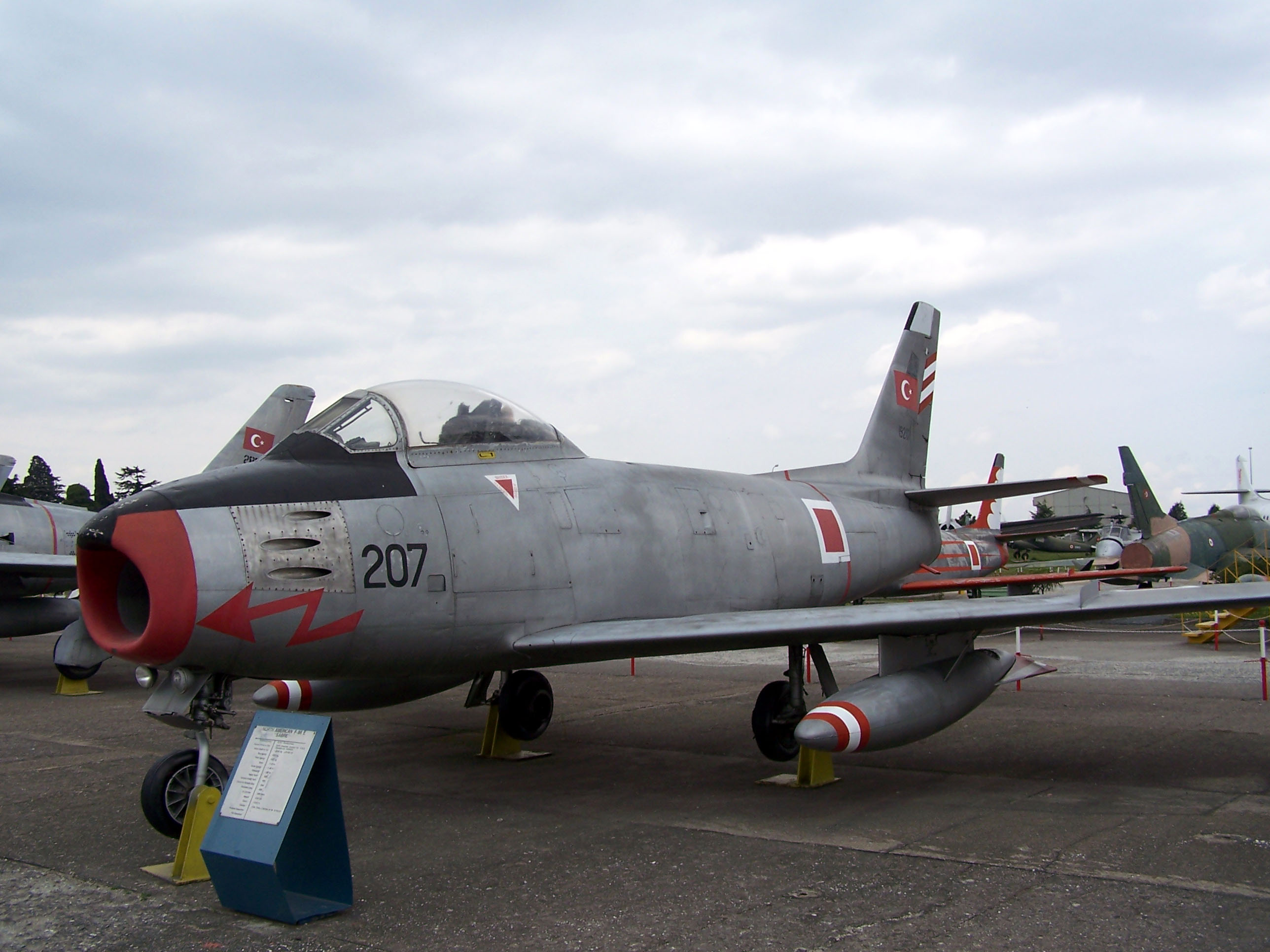 North American F-86 E Sabre in Istanbul Aviation Museum (İstanbul Havacılık Müzesi)